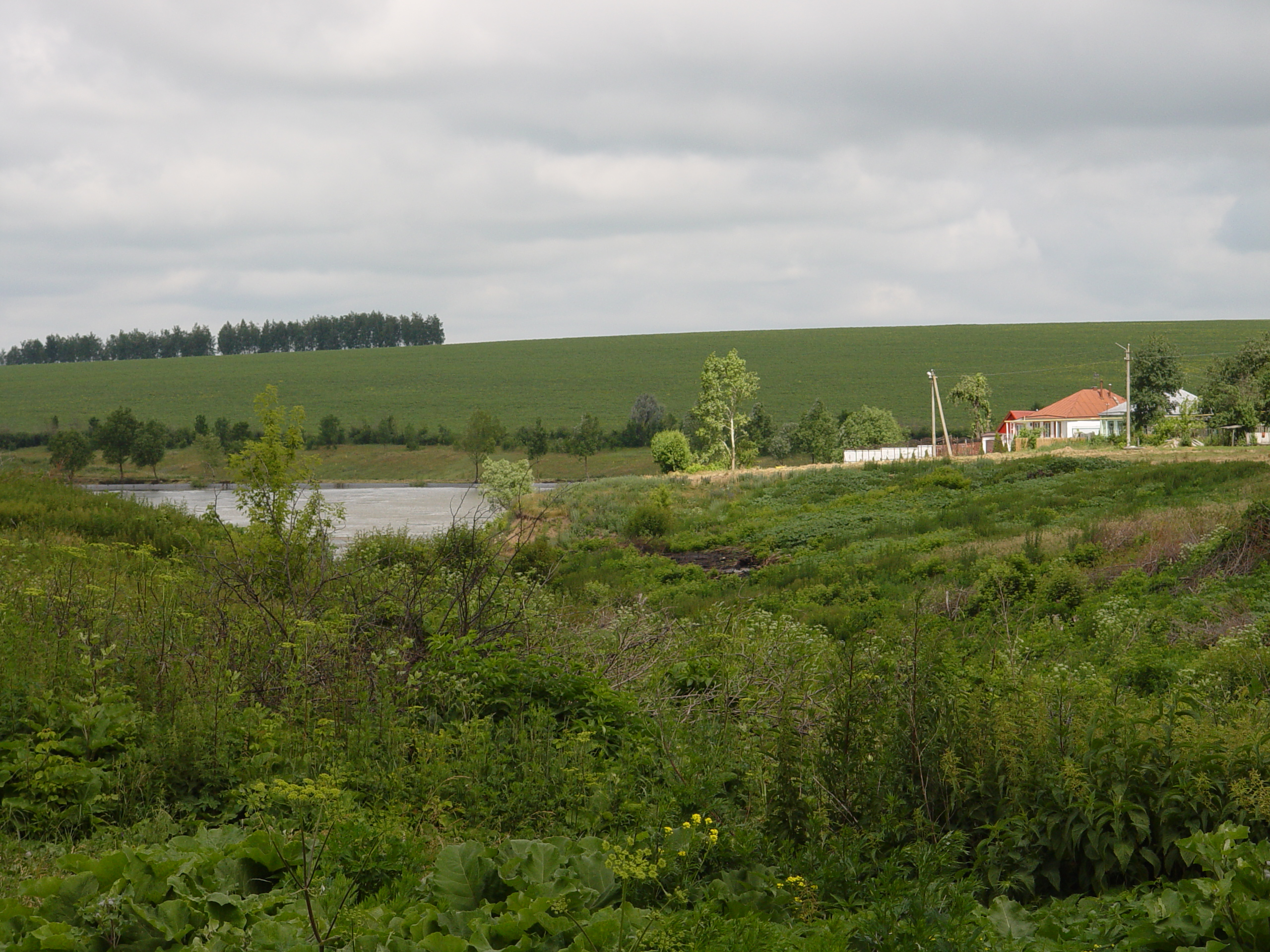 Лазурное улица Дружбы четная сторона